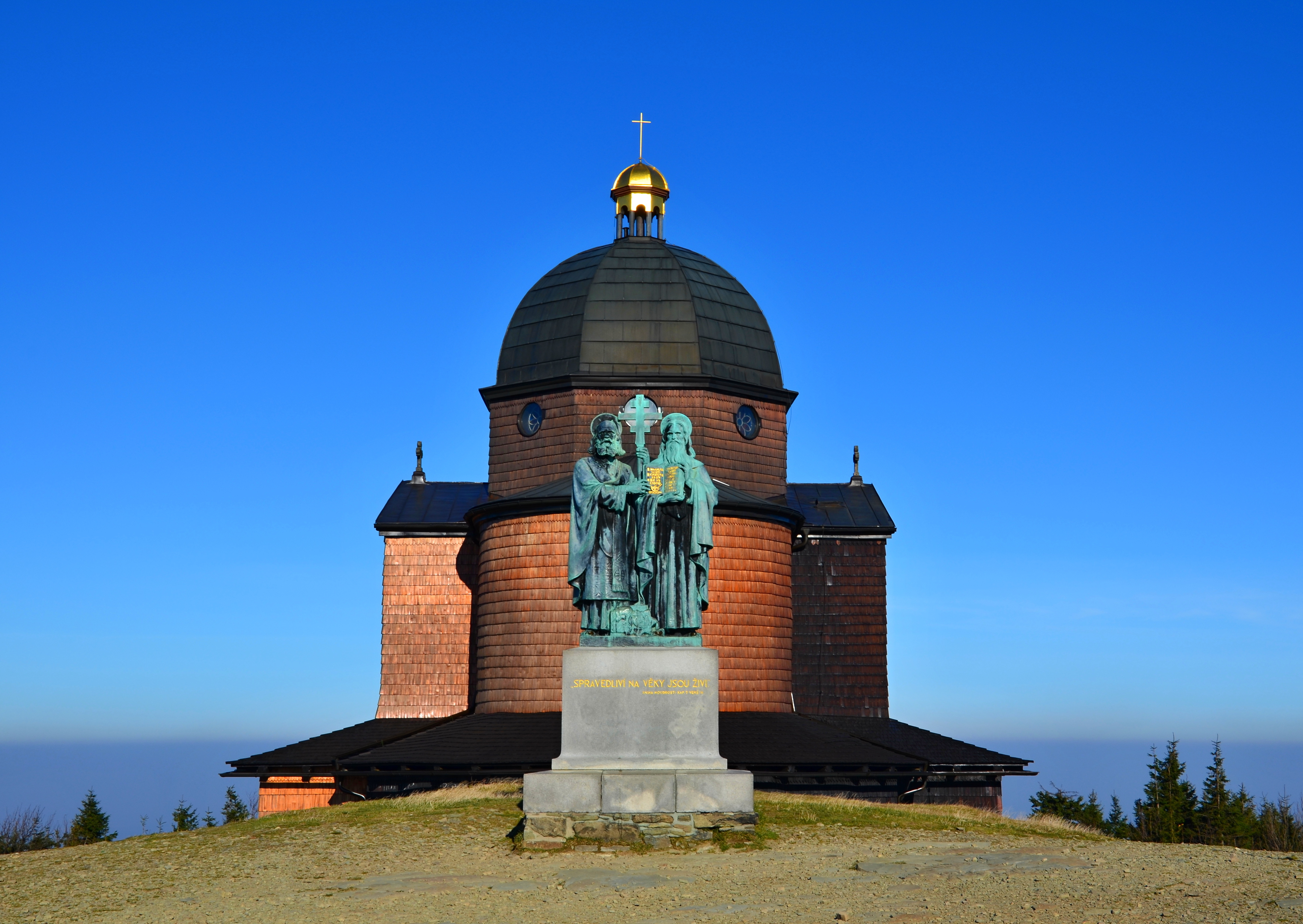 Kaple sv. Cyrila a Metoděje (Dolní Bečva), Radhošť, Dolní Bečva